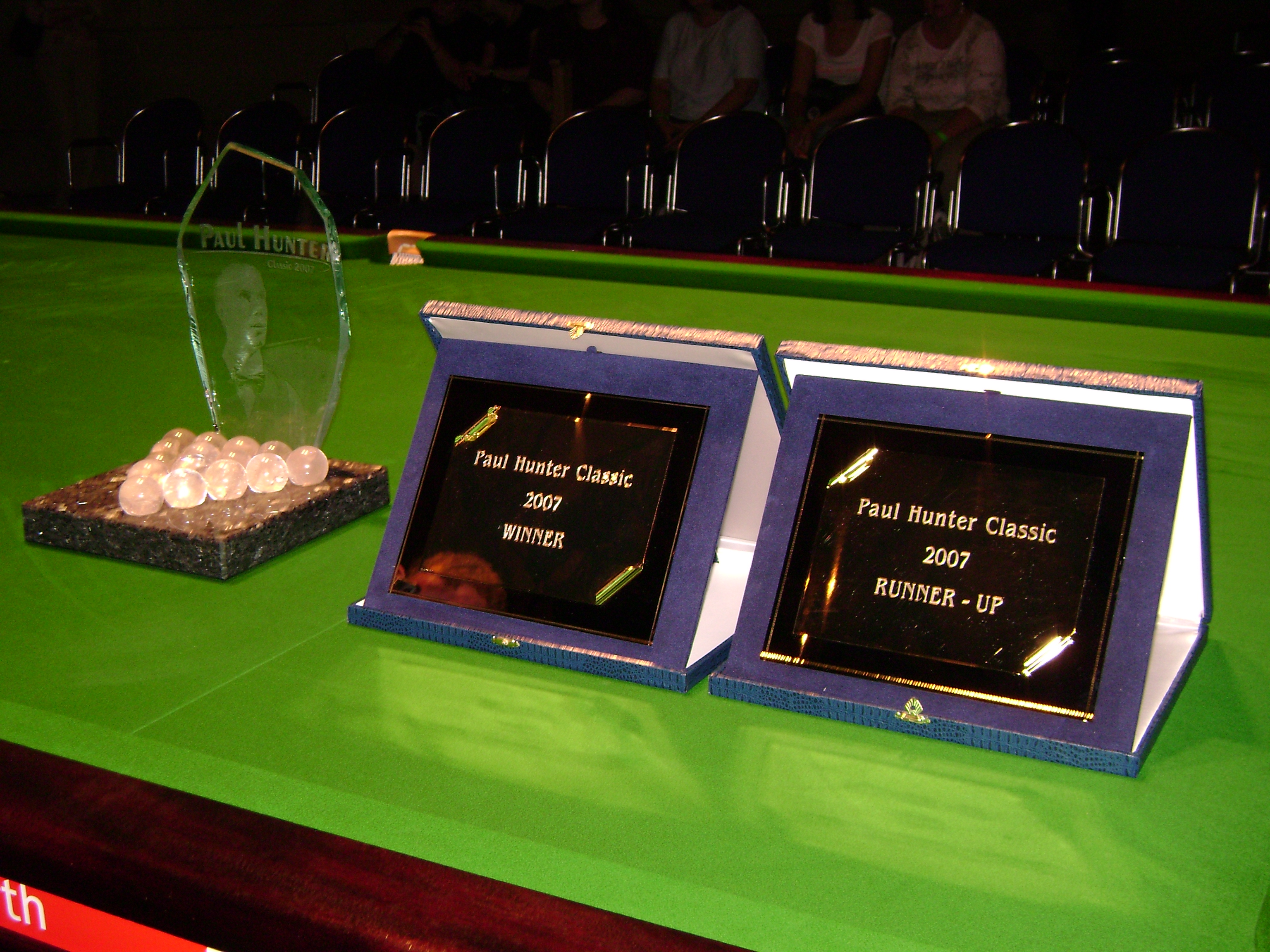 Preise der PHC 2007